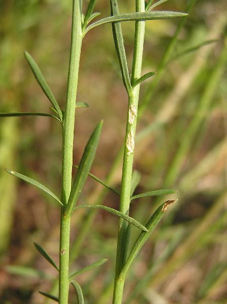 Lepidium graminifolium am Rheinufer in Bonn-Beuel